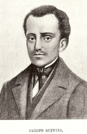 Jacopo Ruffini L'immagine si trova nel libro:I Liberatori, Glorie e figure del Risorgimento- Scritto da Pasquale de Luca e stampato dall'Istituto Italiano di Arti Grafiche a Bergamo nel 1909